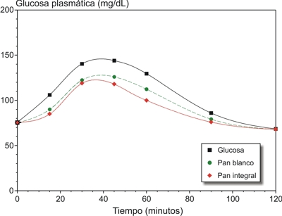 Respuesta glucémica tras la ingesta de glucosa (referencia), pan blanco y pan integral. Permite establecer el "índice glucémico" de estos dos últimos productos.